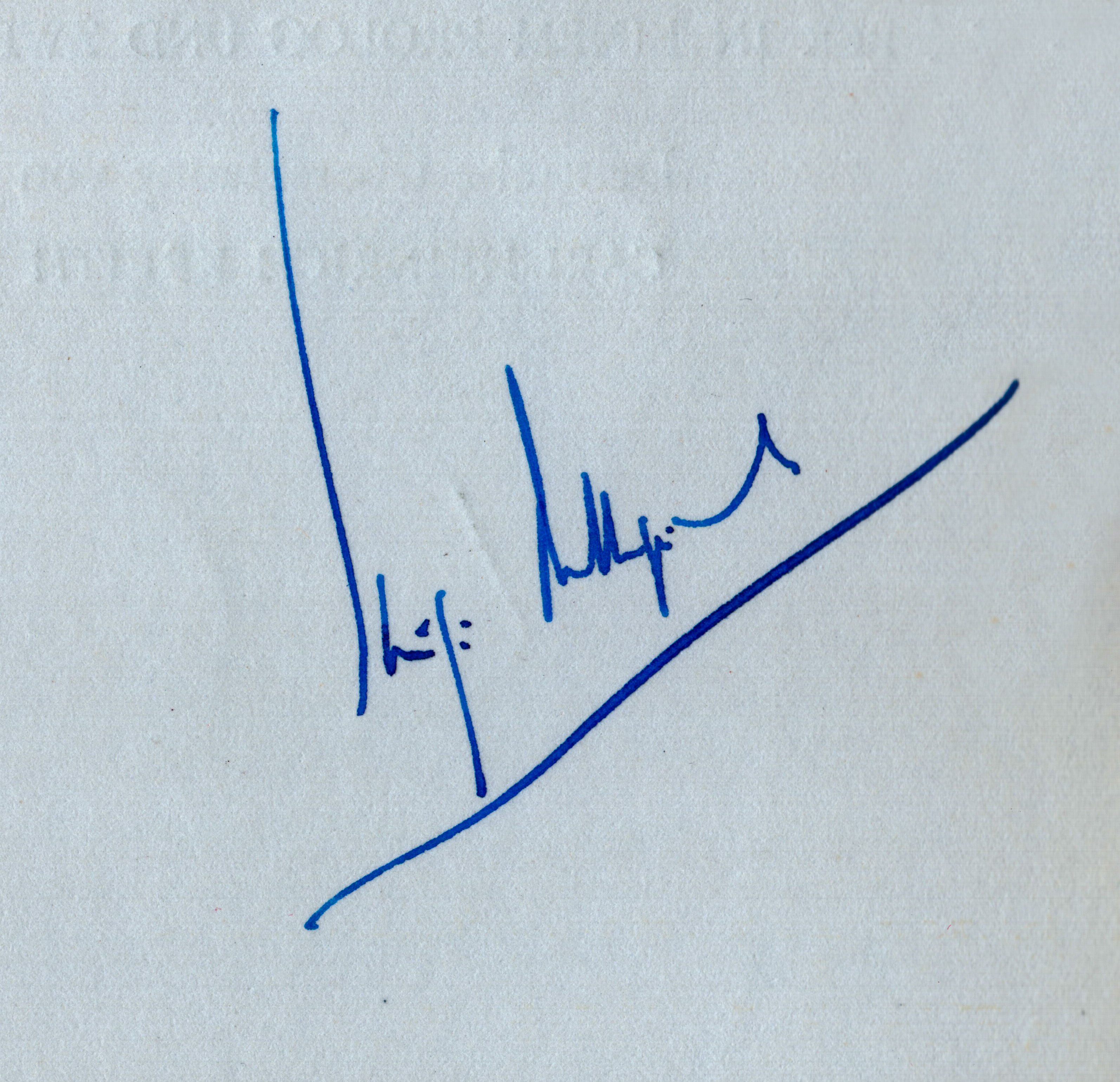 Автограф композитора Луиджи Даллапикколы, сделанный на развороте немецкого издания либретто его оперы "Улисс".